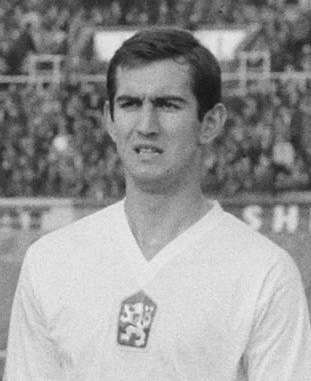 Ladislav Kuna v roce 1966